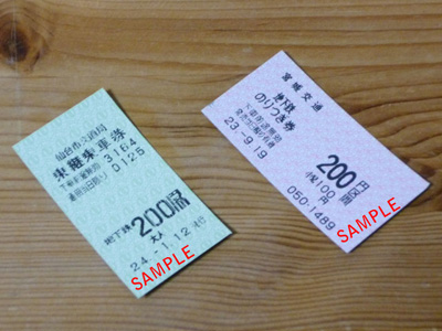 仙台市営地下鉄 路線バスから地下鉄への乗継ぎ乗車券 左：仙台市バス車内販売 右：宮城交通バス車内販売